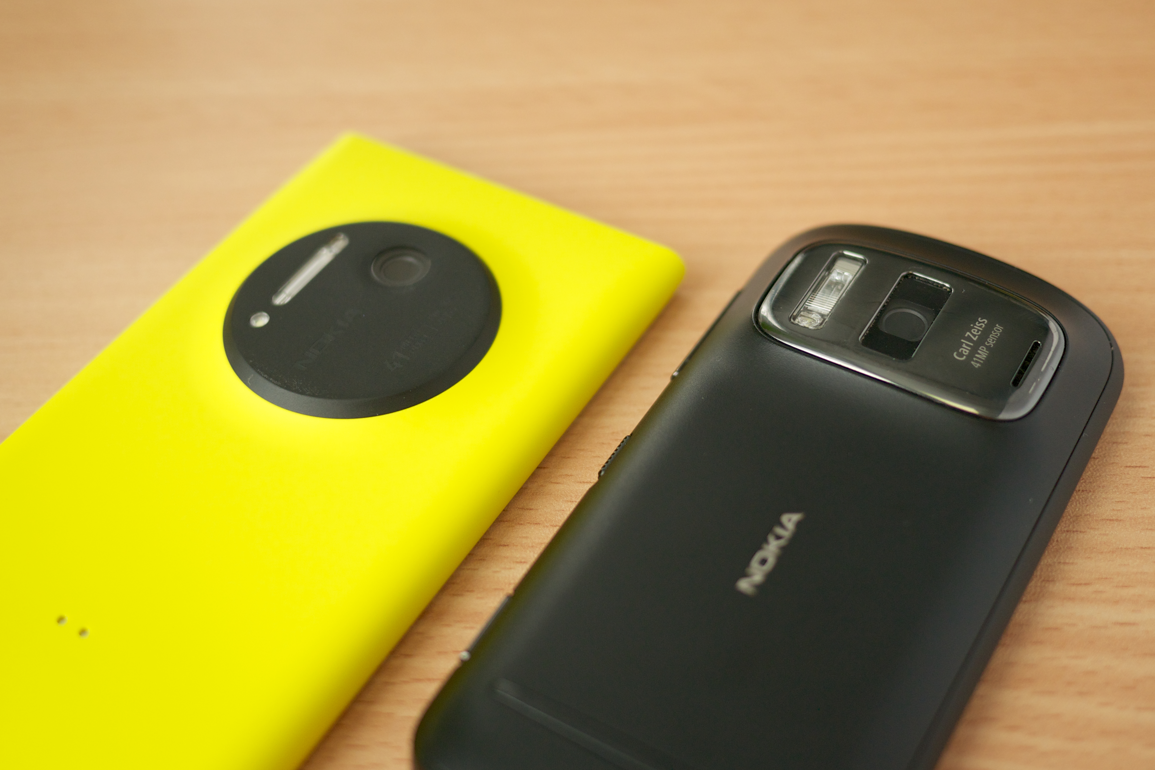 82 megapixels :)